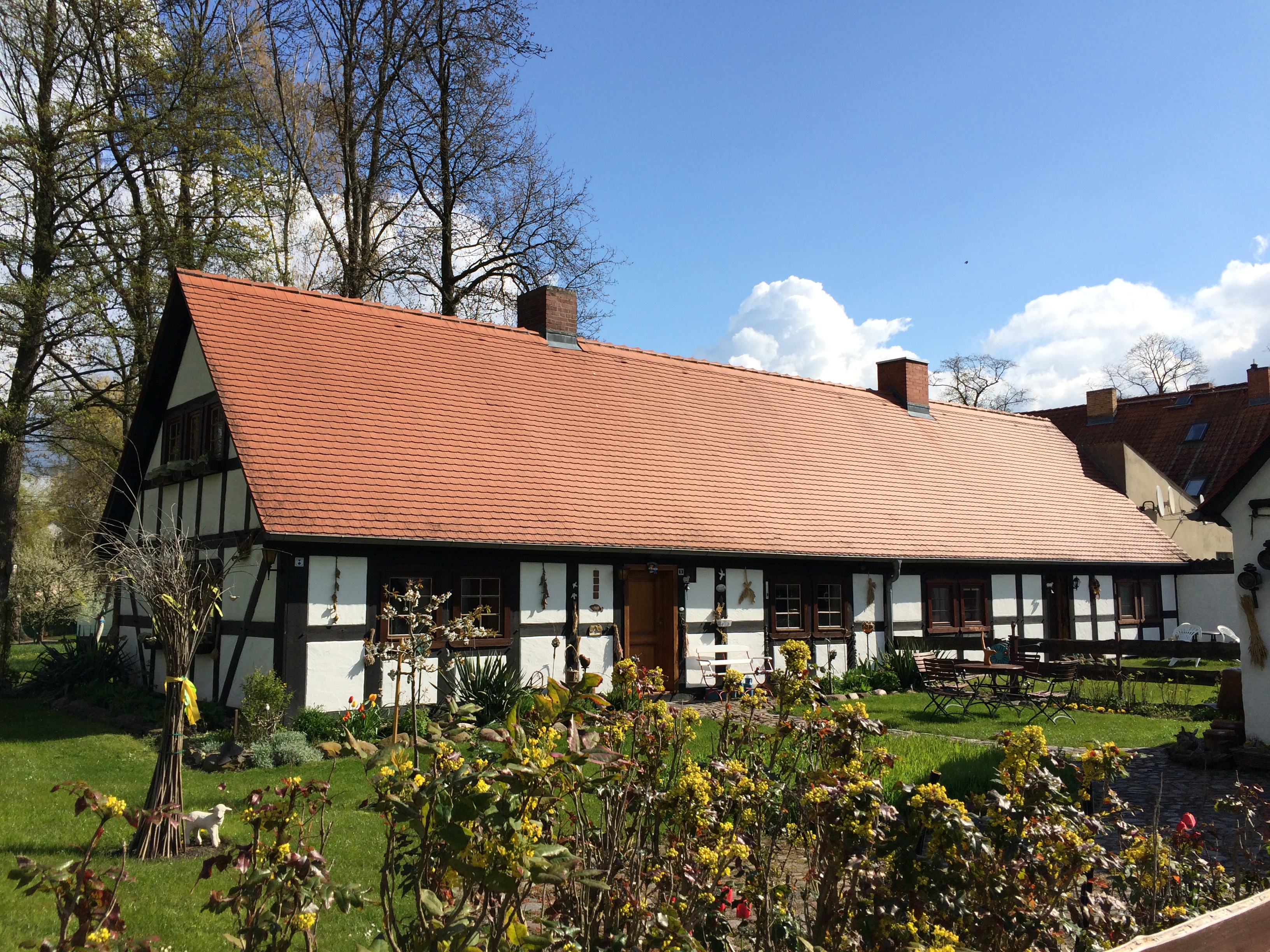 Denkmalgeschütztes Fachwerkhaus im Schäferweg 2 in Teupitz